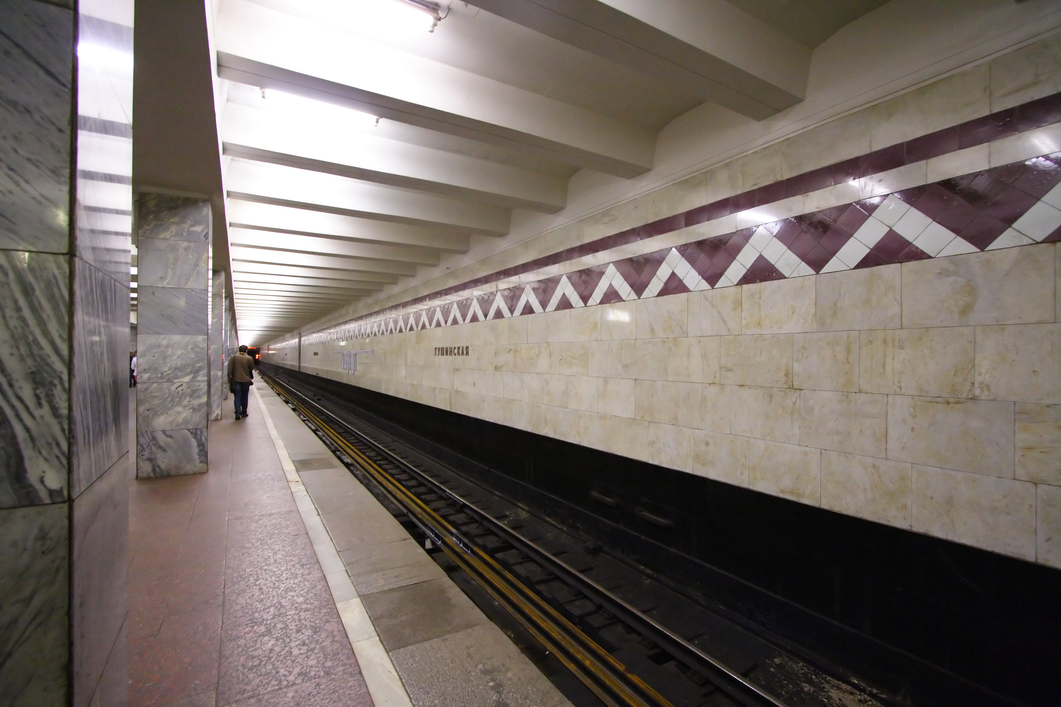 Станция метро Тушинская, одна из стен